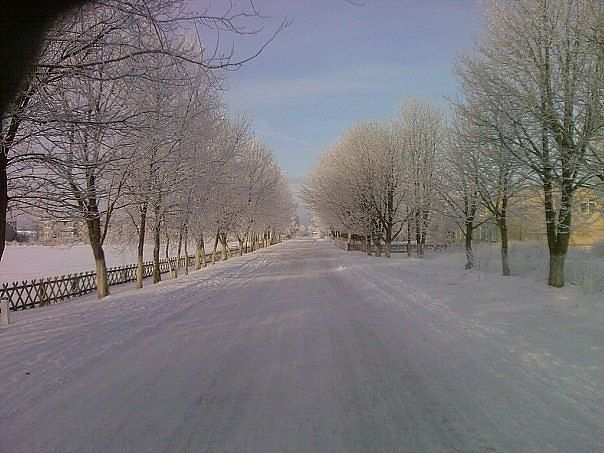 деревня Сыроватки зимой 2009 rода, на фото улица Школьная